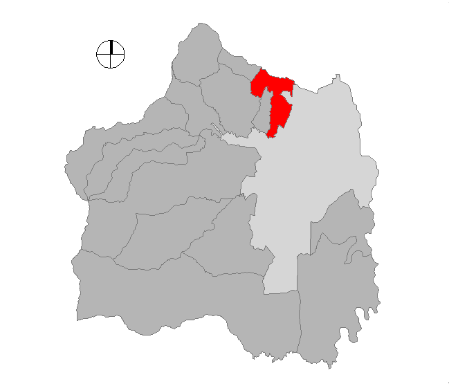 Corregimiento de Cali, Colombia